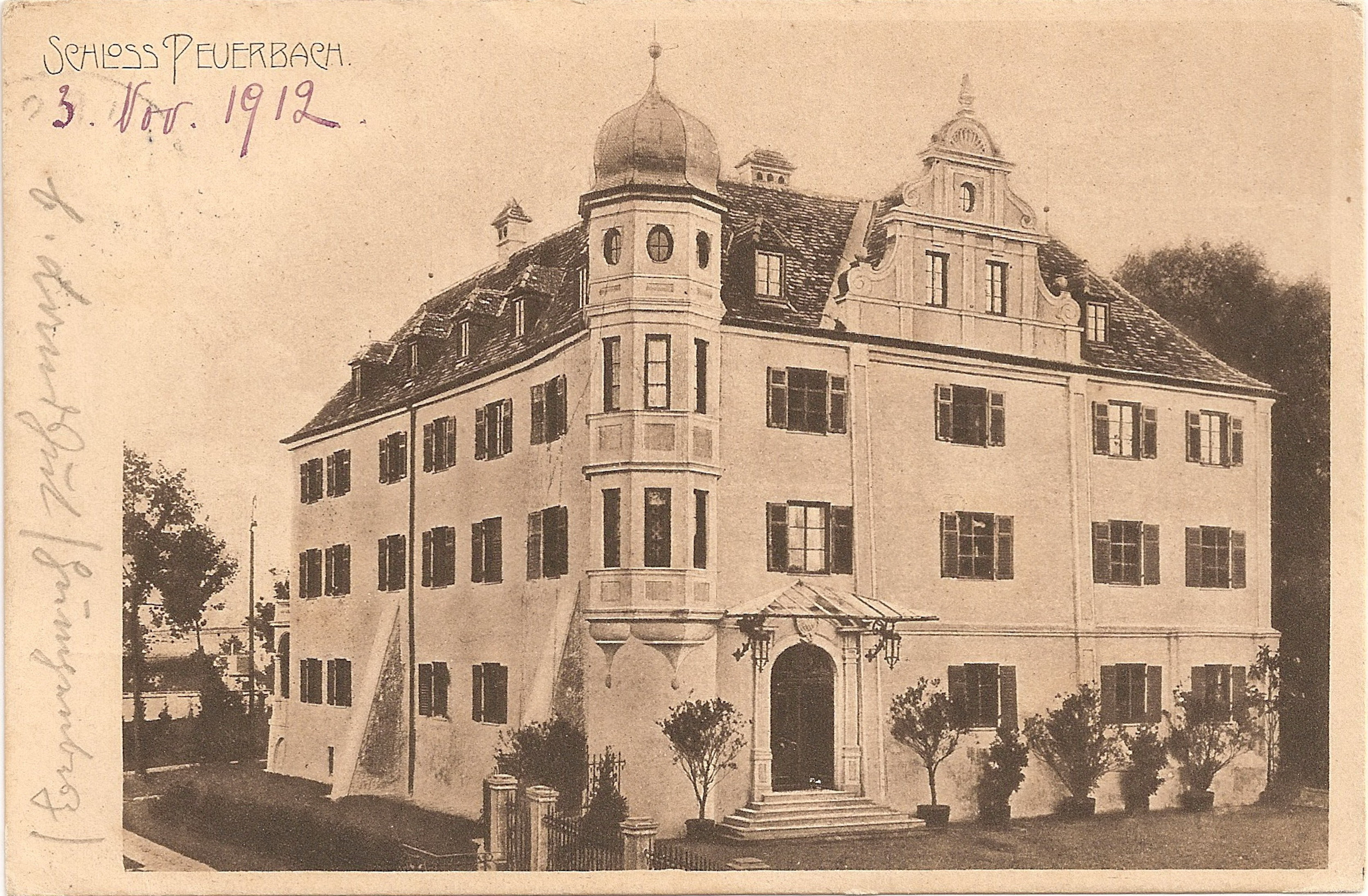 Schloss Peuerbach in Bayerbach bei Ergoldsbach. Postkarte aus dem Jahre 1912. Die Postkarte wurde am 3. November 1912 in Bayerbach geschrieben und beim Postamt in Ergoldsbach an eine Comptesse nach Schloss Sommerhausen geschickt.